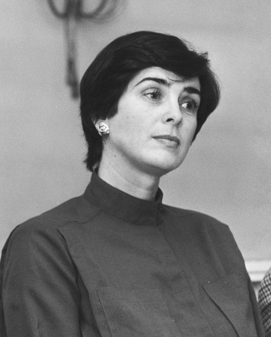 Nolda Broekstra, wife of Kirill Kondrashin